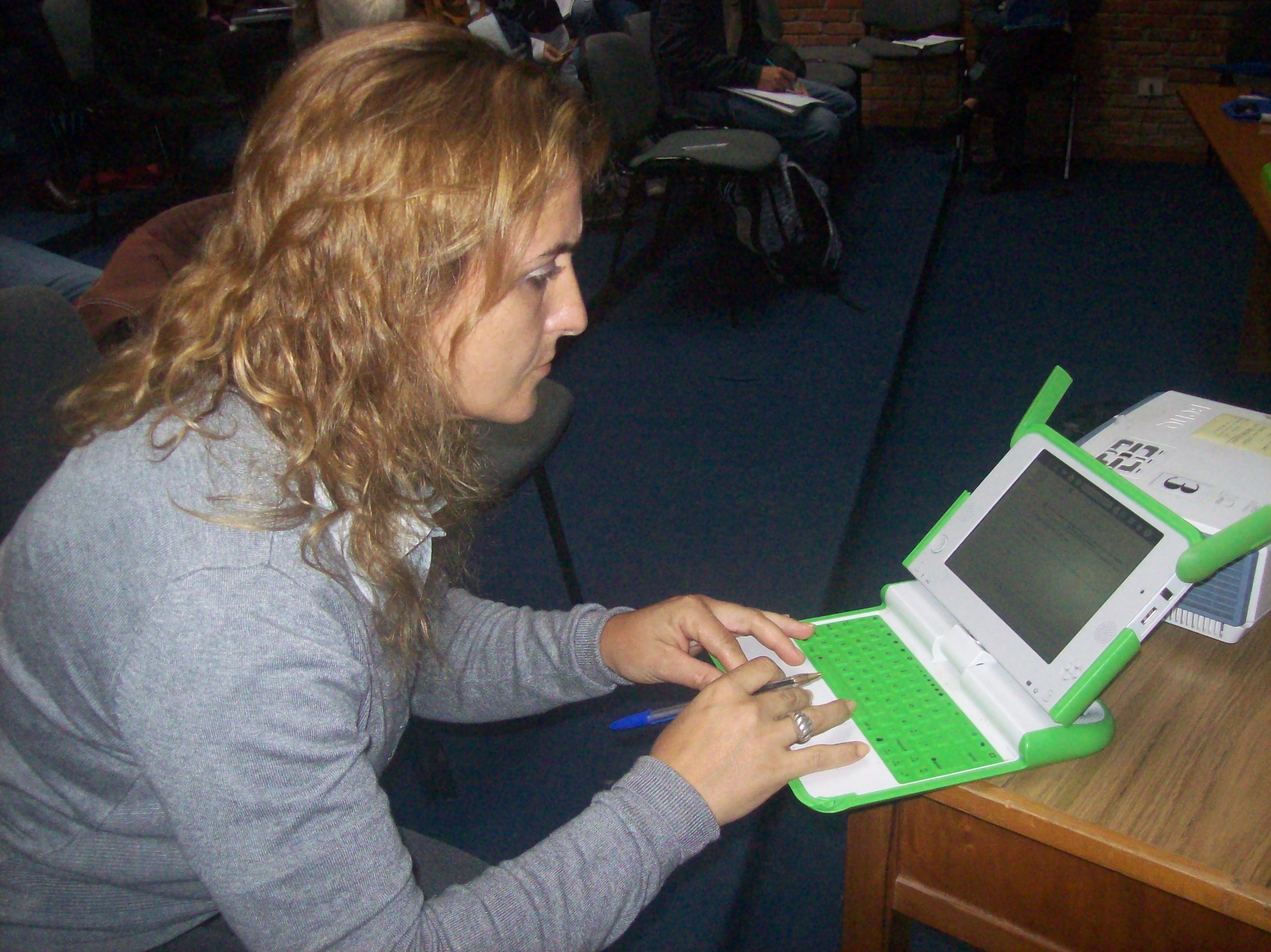 Using xos to edit a Wikipedia article